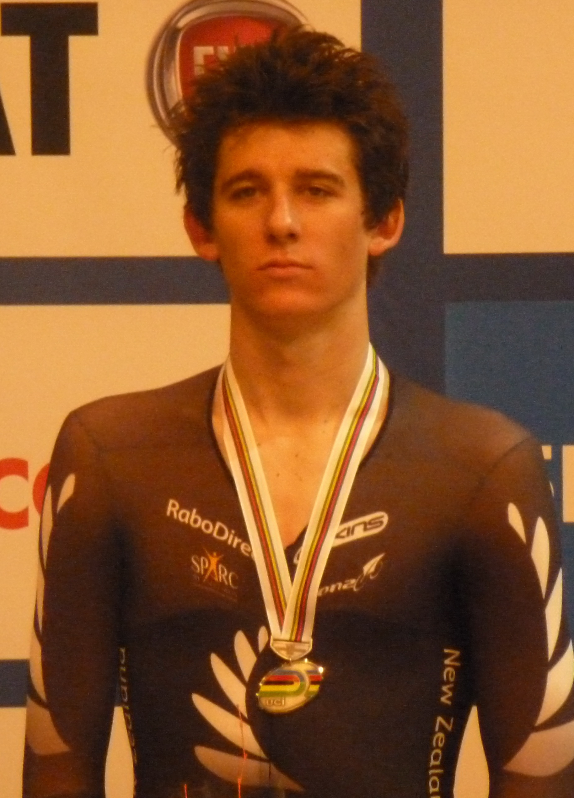 Jesse Sergent, neuseeländischer Radrennfahrer